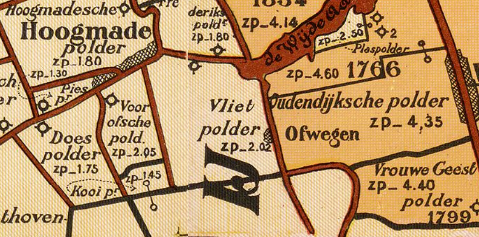 Vlietpolder